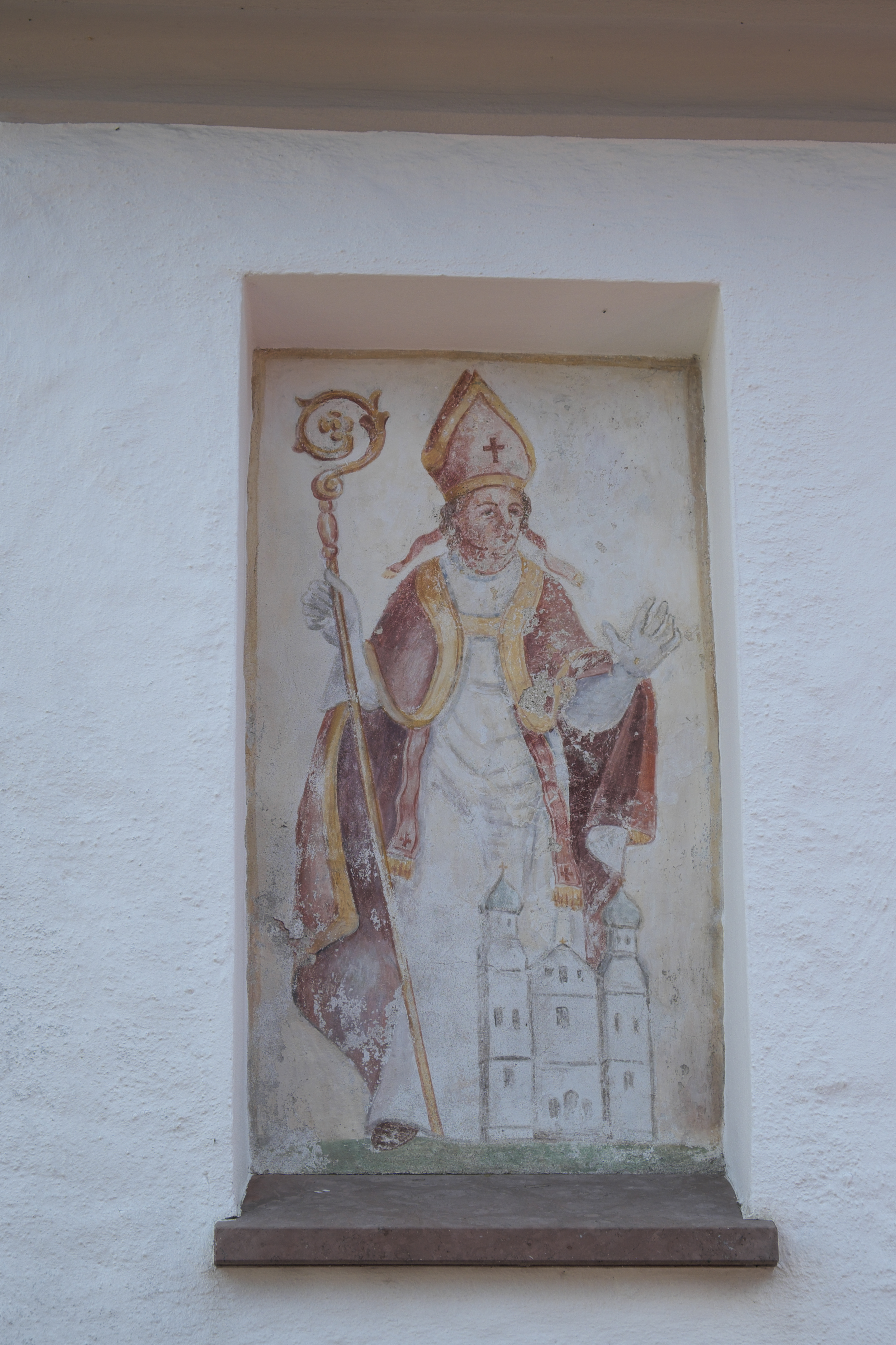 Katholische Filialkirche St. Rupertus in Gaden (Waging am See) im Landkreis Traunstein (Bayern/Deutschland), heiliger Rupertus, Malerei an der Vorhalle